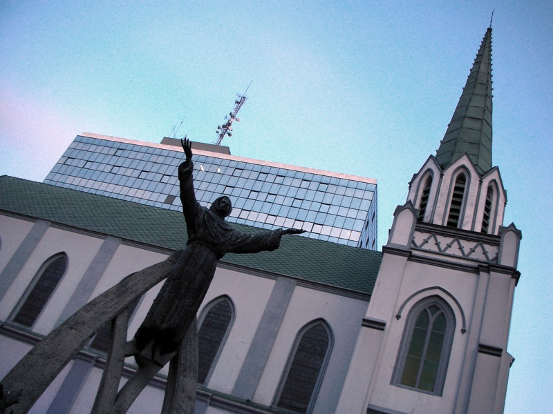 Exterior de la Iglesia de la Porciúncula, en Bogotá.